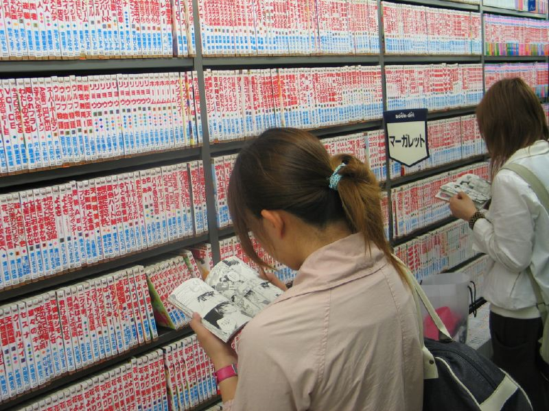 Tokyo, Japan